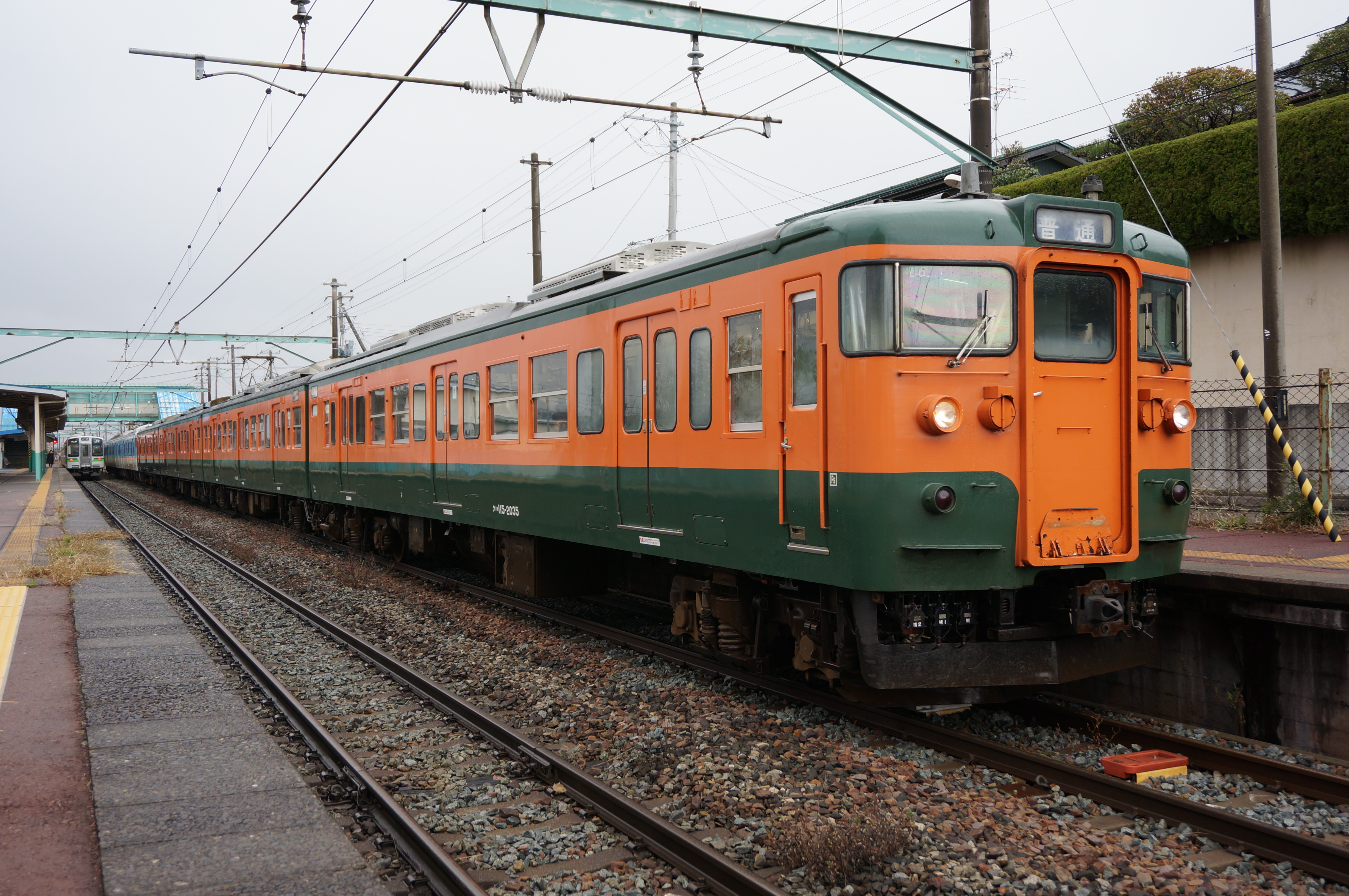 2番線停車中の115系（2013年11月）